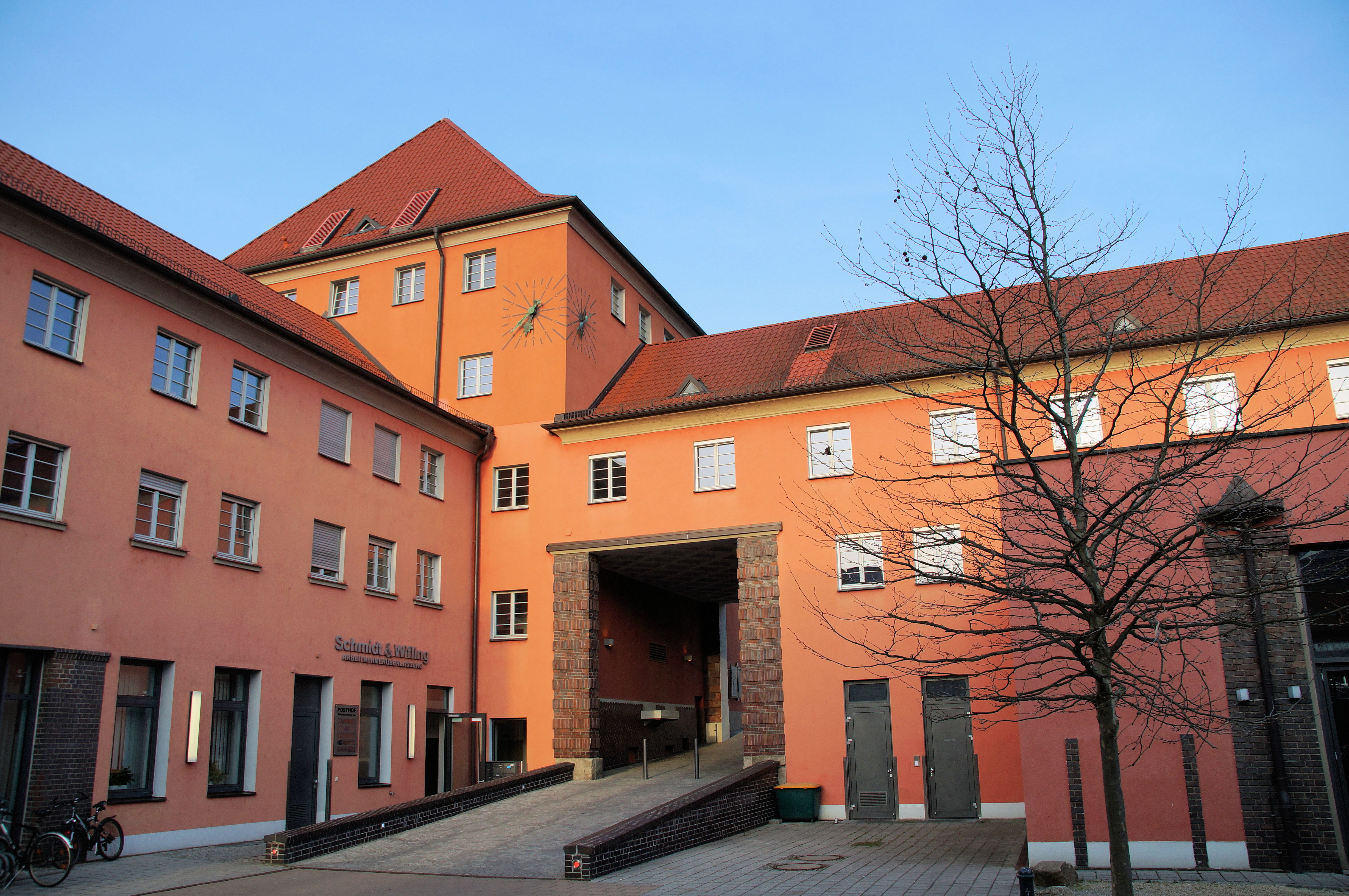 Ehemalige Kraftwagenhallen mit Postbediensteten-Wohnungen , Dreiflügelanlage in Ecklage, zweigeschossige Flügelbauten mit Walmdächern und einem viergeschossigen Walmdachbau an der Nordostecke, Wohntrakt nach Norden mit Treppenhausrisaliten und dekorativem Fassadenschmuck, 1925/27